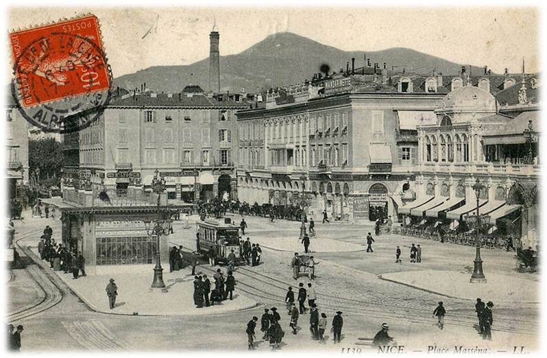 Place Masséna au début des années 1900 avec la mise en place du tramway et au centre la station centrale